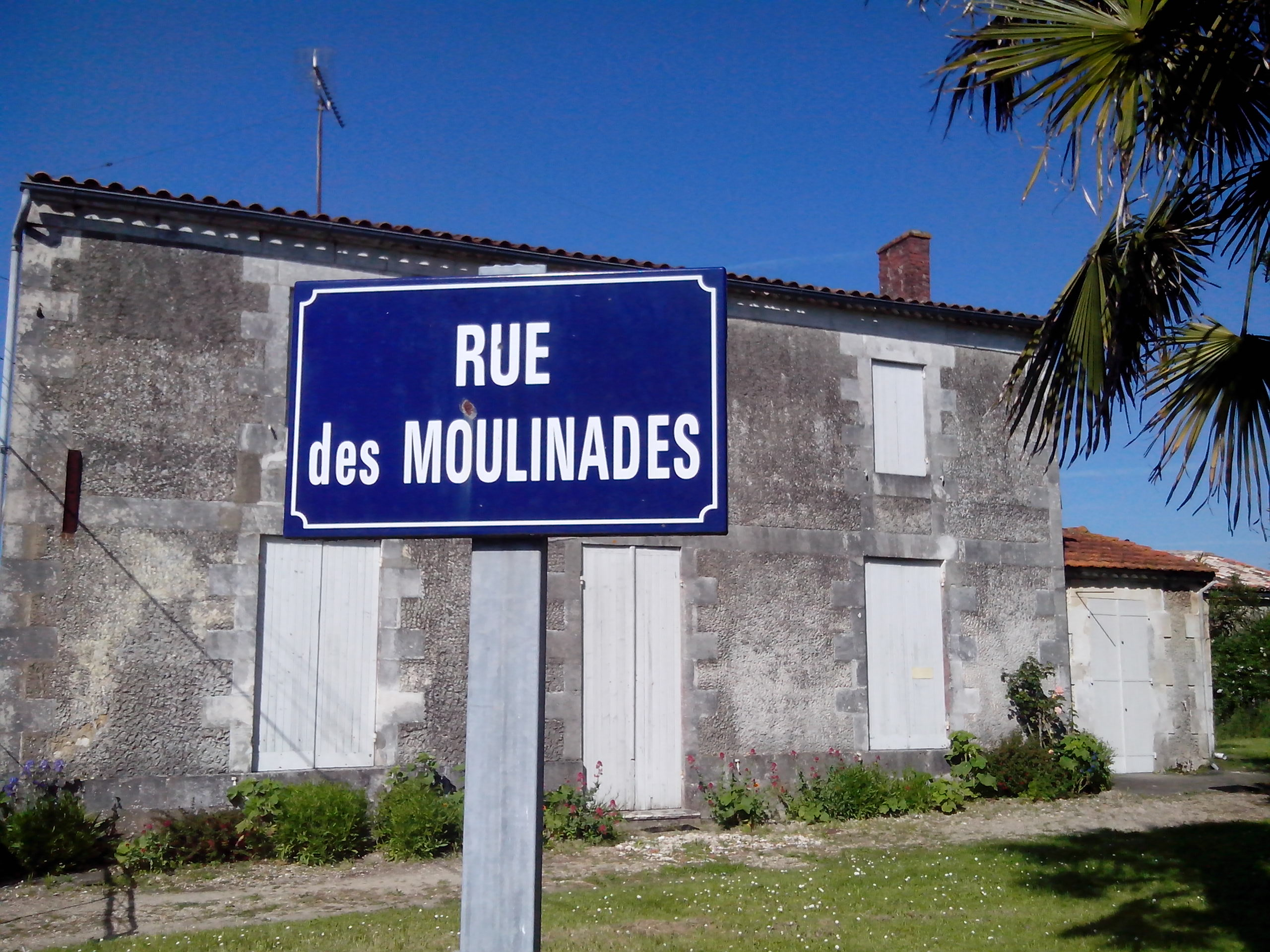 Maison ancienne de la rue des Moulinades, à Arvert